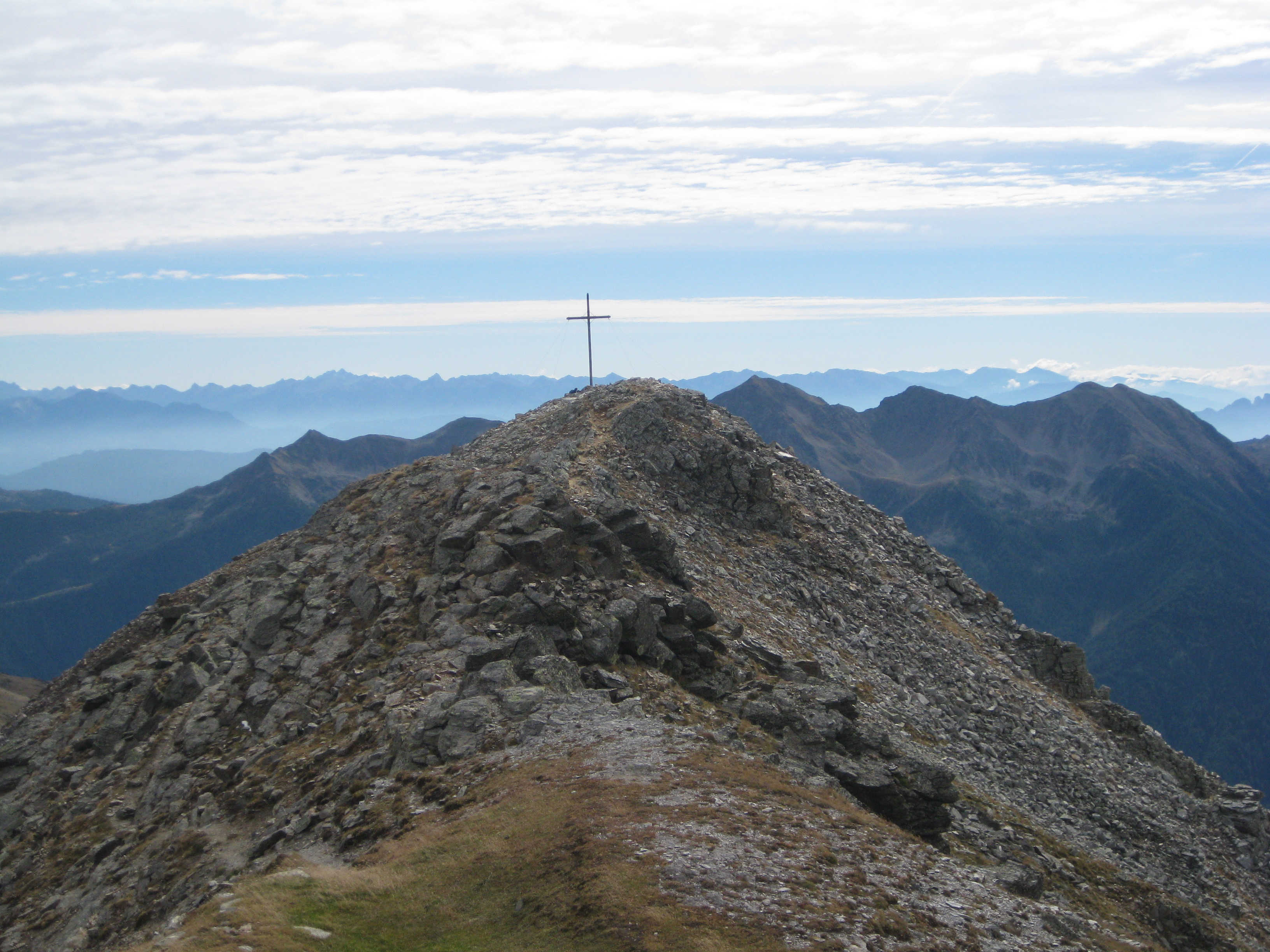 Der Südgipfel des Hohen Diebs in Südtirol